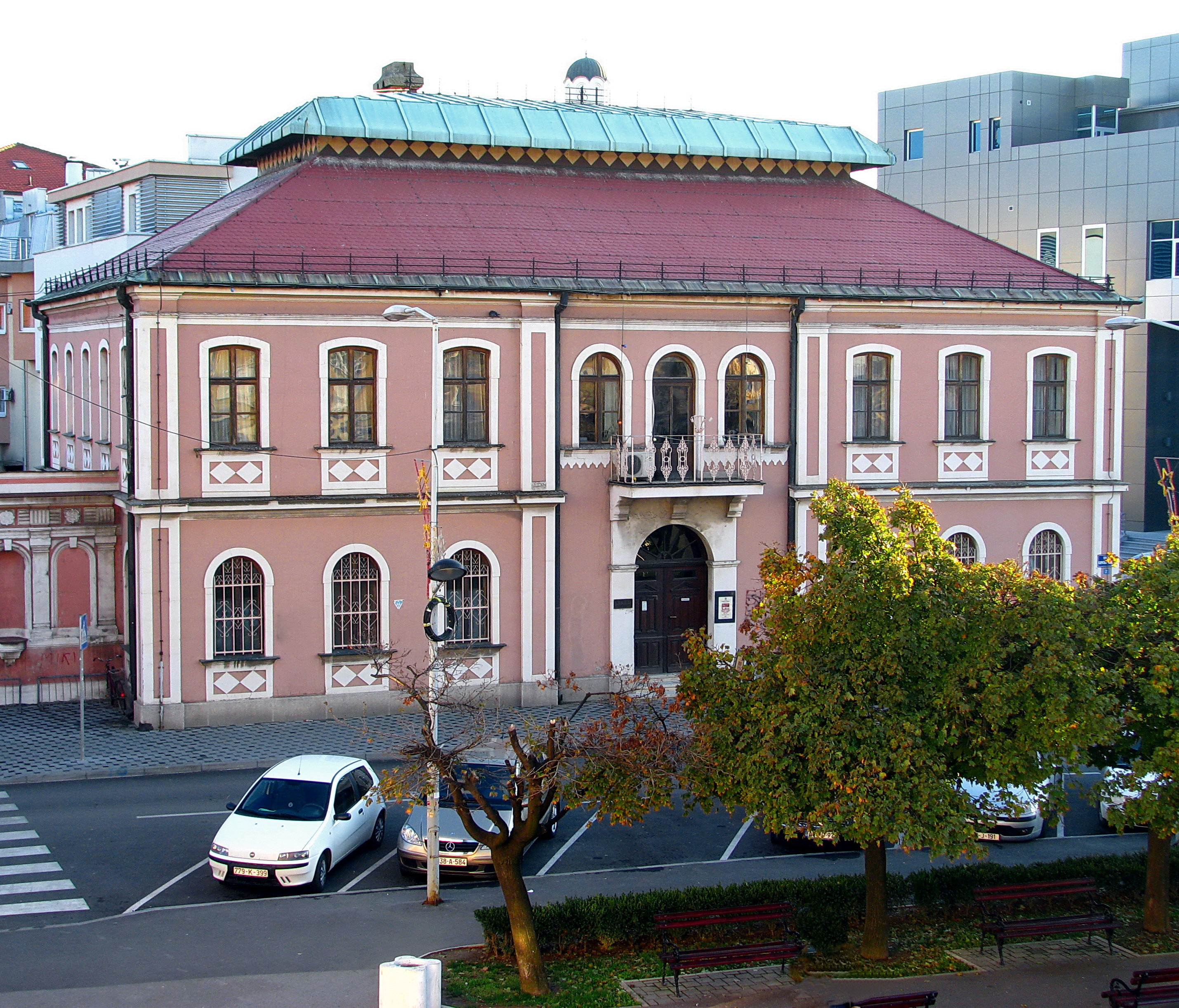 Музеј Семберије, Бијељина ID добра: NKD213